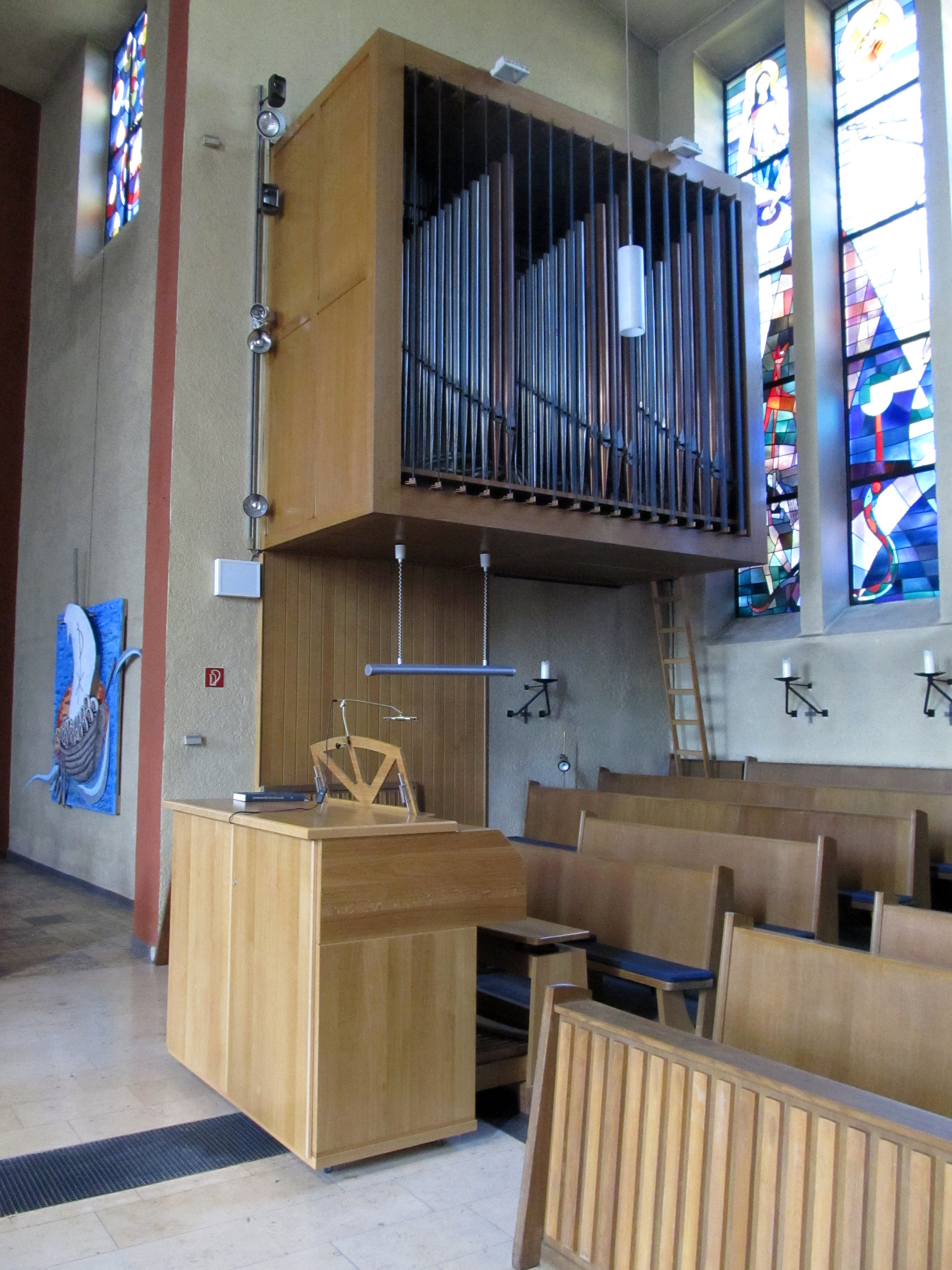 Orgelwerk und Orgel-Spieltisch in der kath. Pfarrkirche Maria vom Frieden in Homburg-Erbach, Saarland